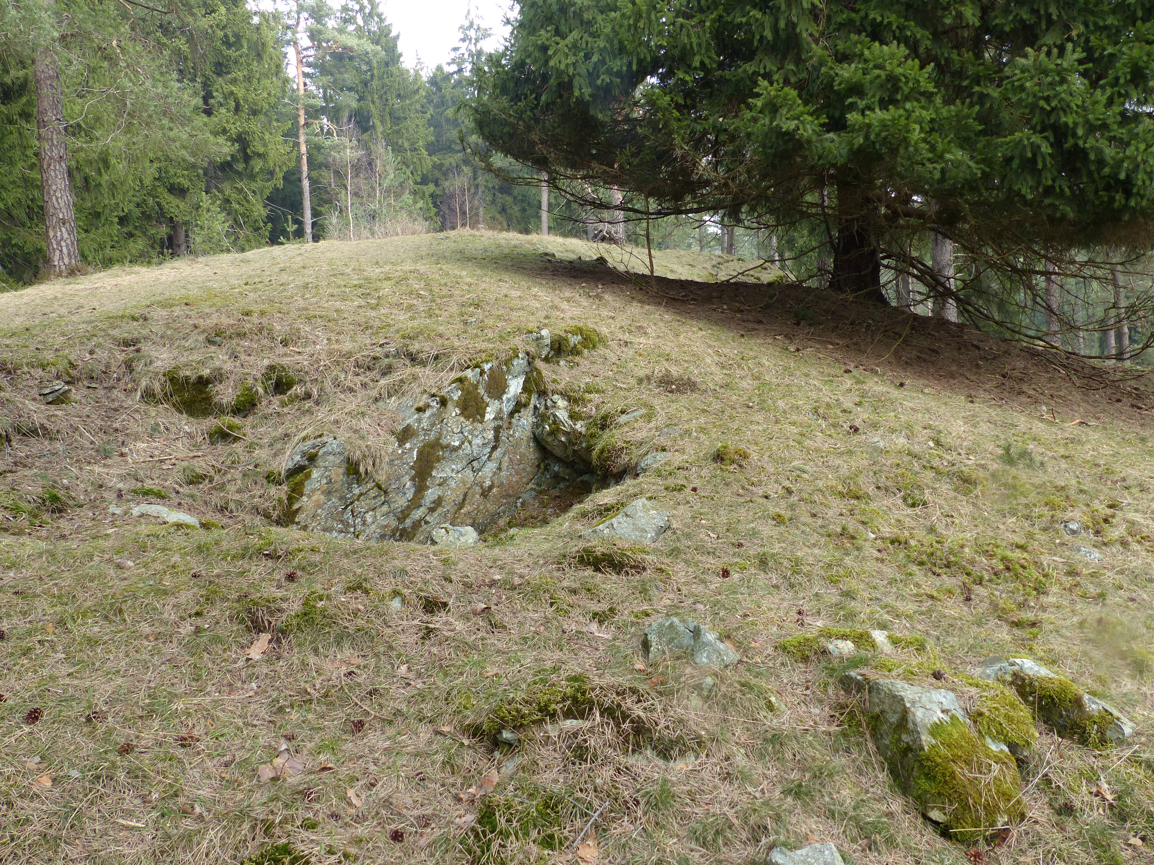 Haidberg bei Zell im Fichtelgebirge, Geotop und Berg